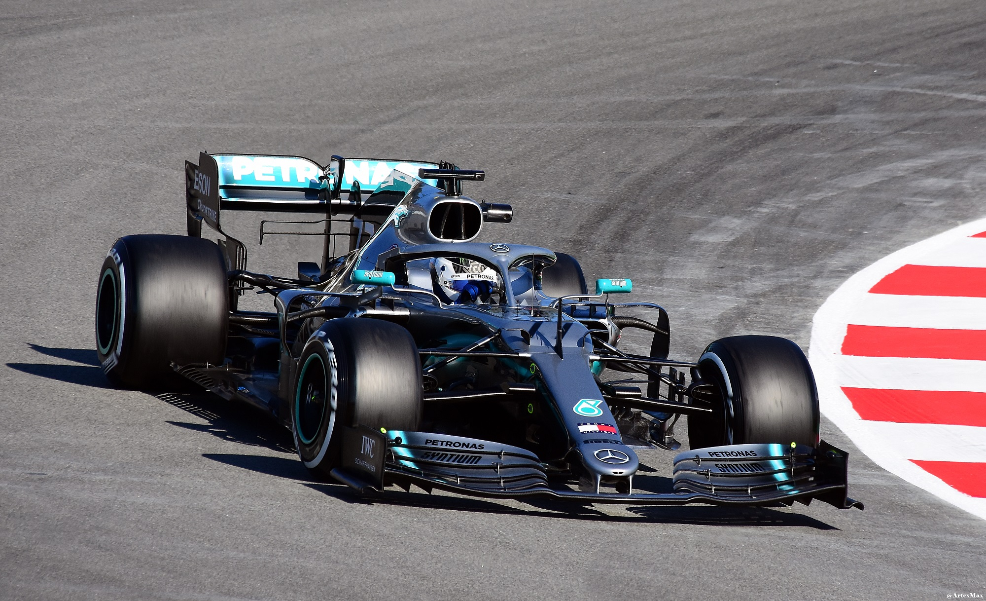 2019 Formula One tests Barcelona, Bottas.